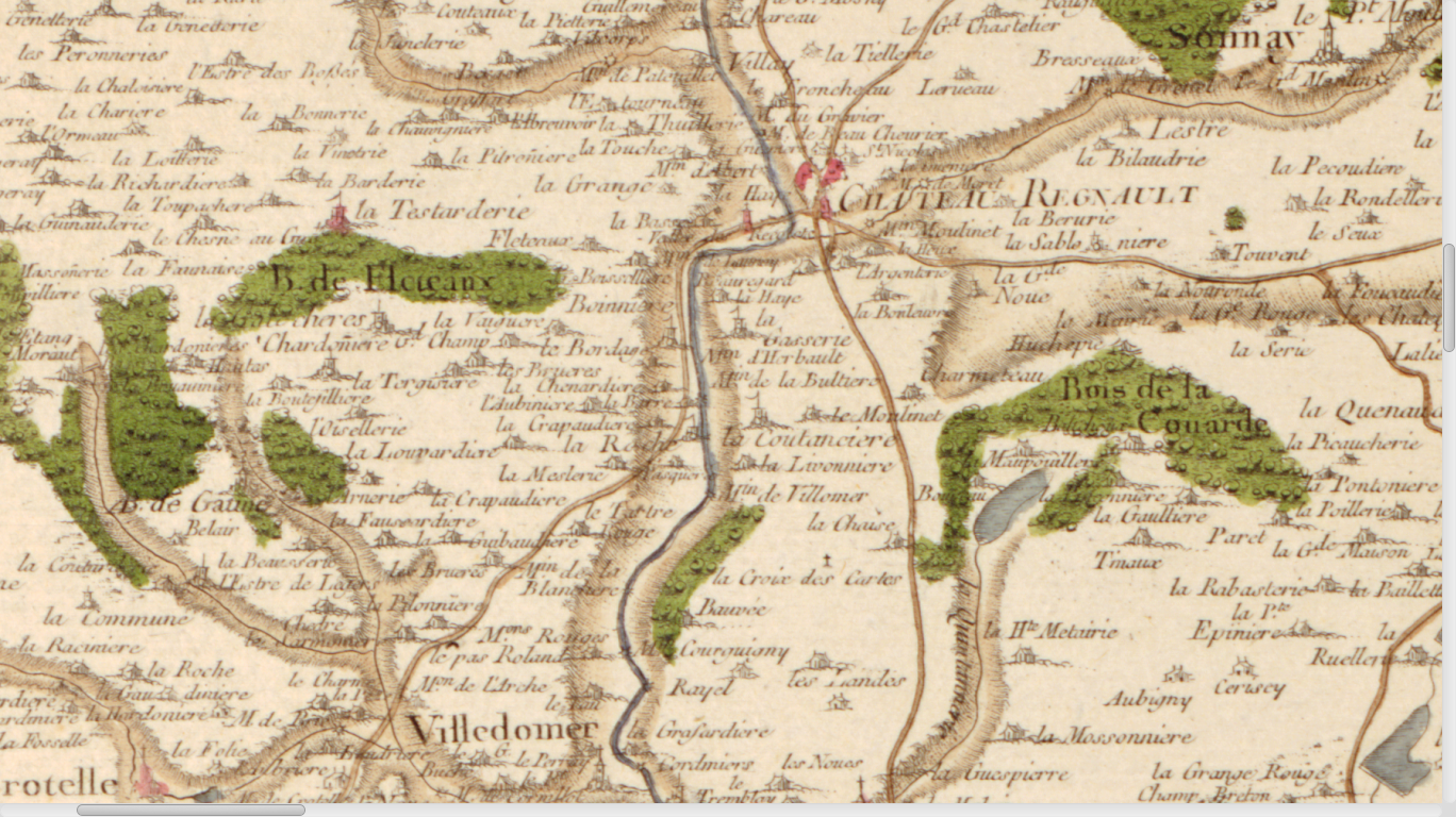 Carte de Cassini n°29, zoom sur Château-Regnault, 1756.